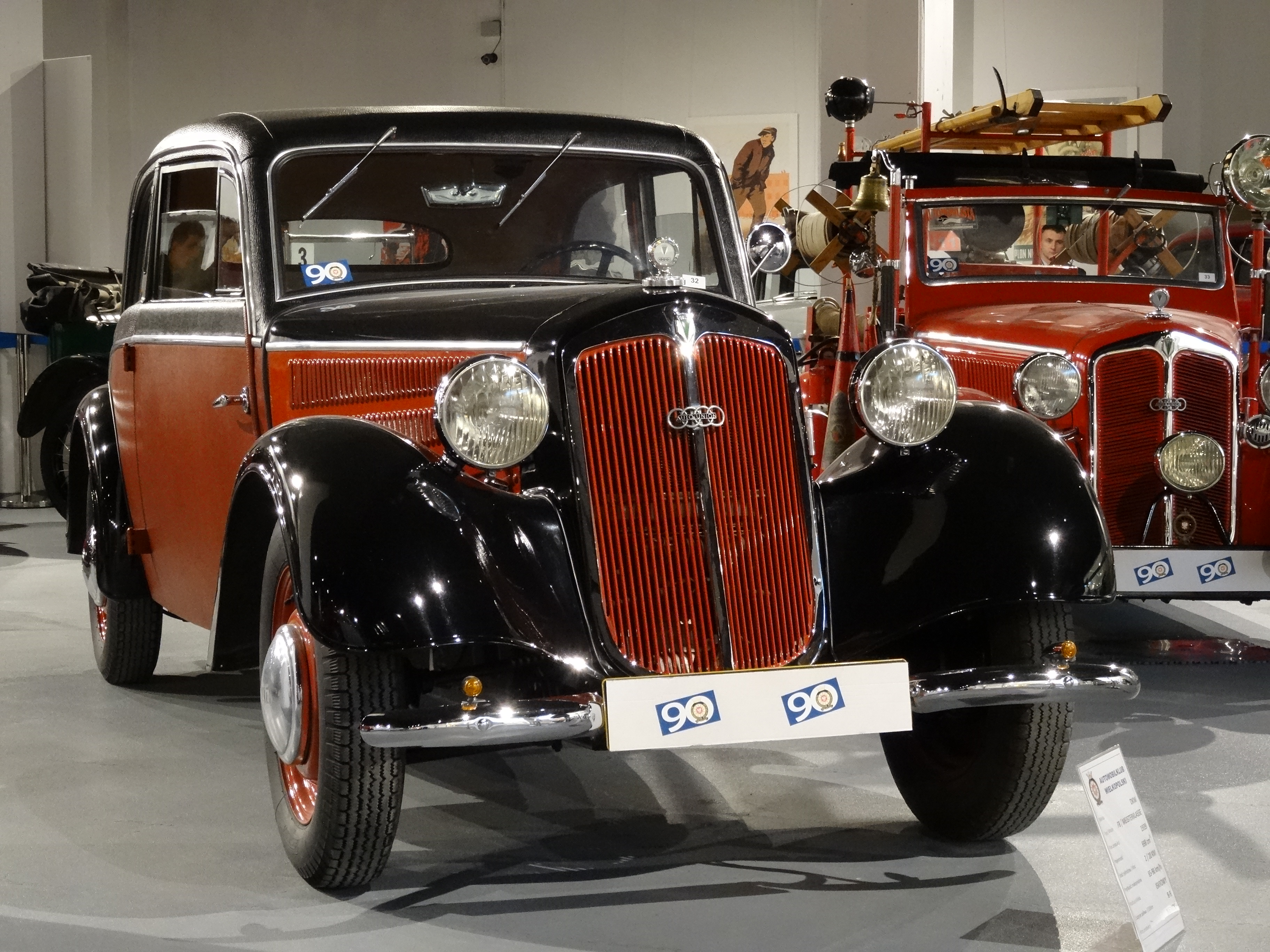 DKW F8 Meisterklasse, Niemcy, 1939 r.